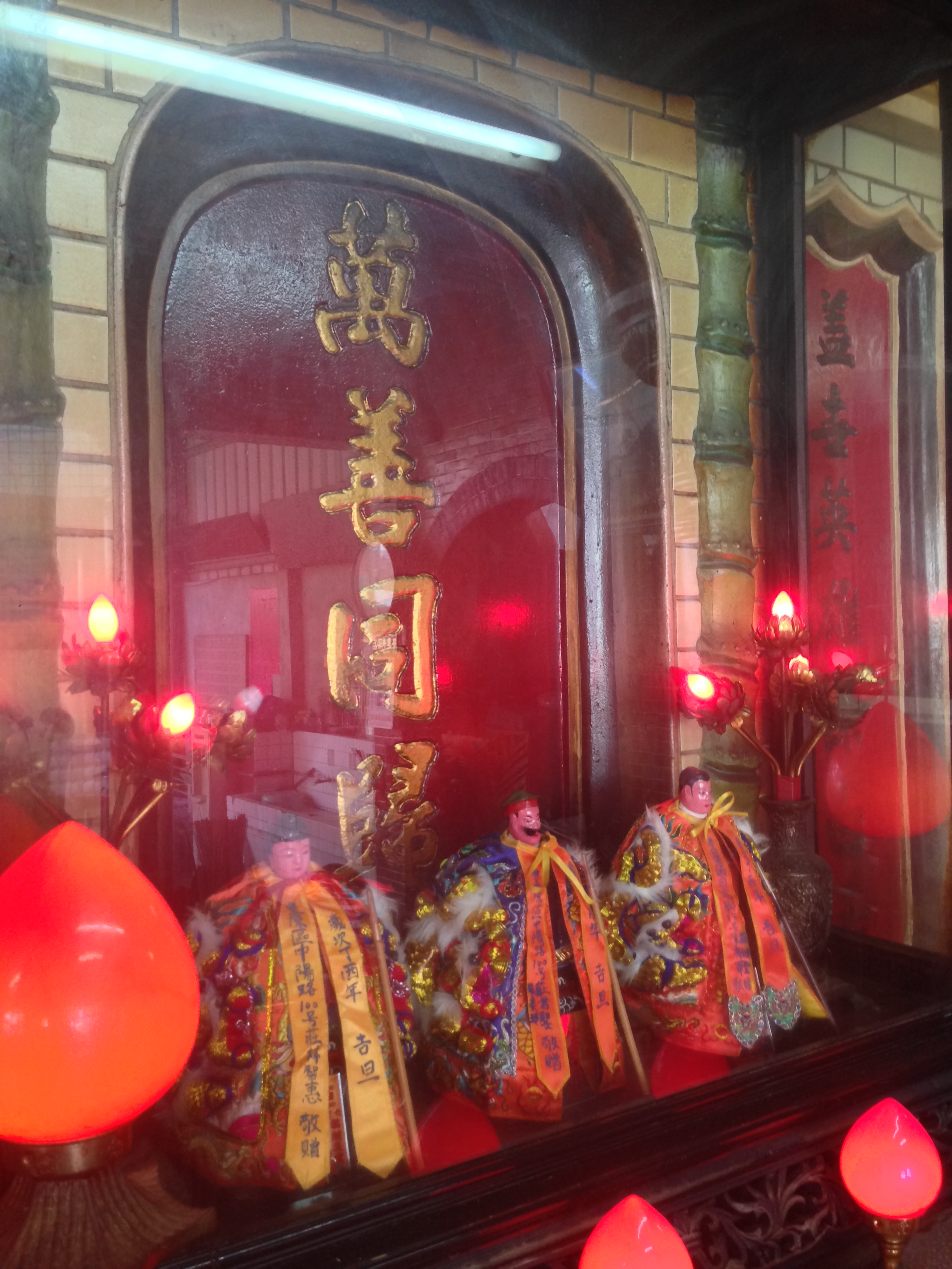 聚星觀神像